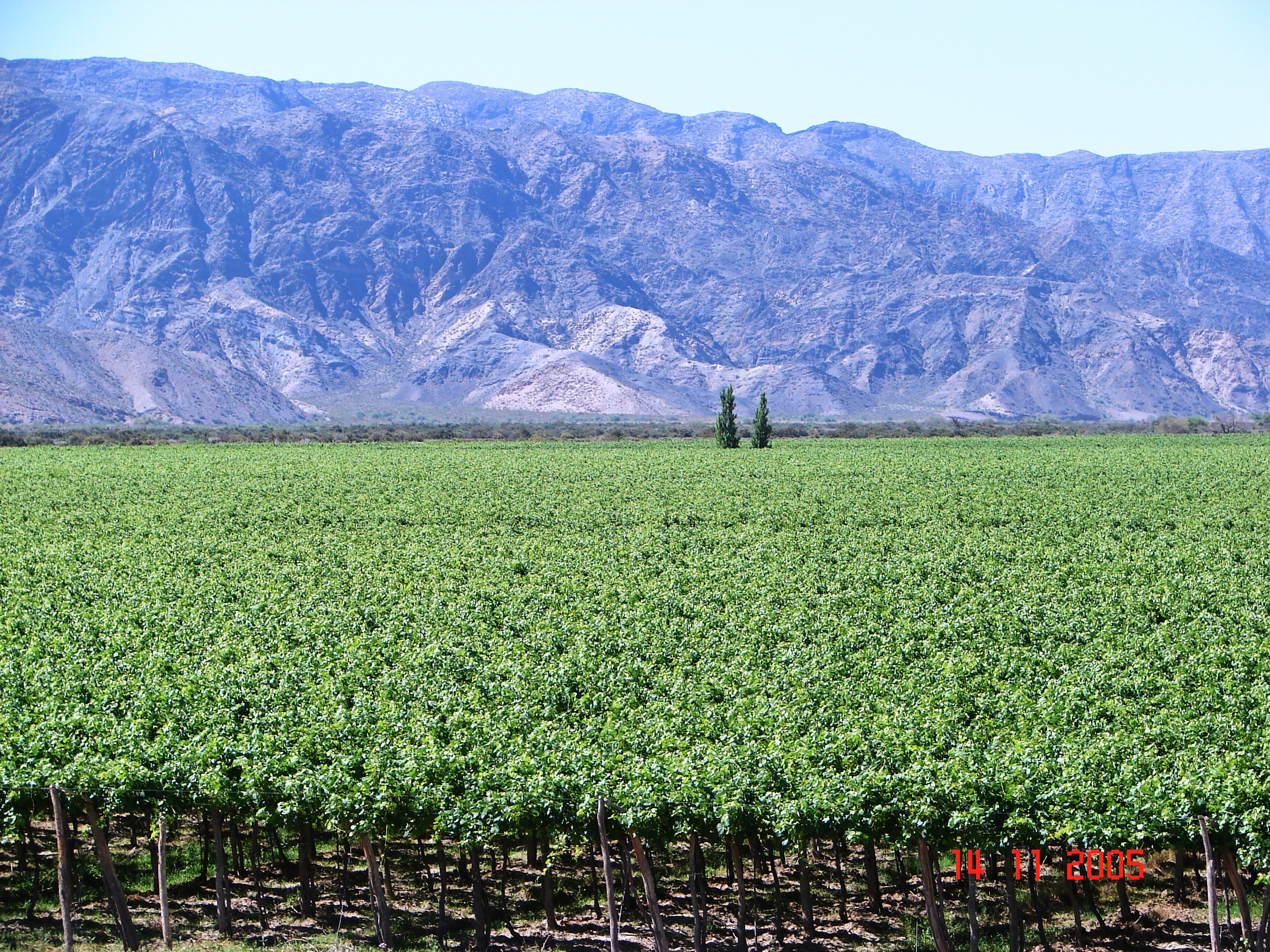 Viñedos en la finca La Germania, San Isidro, departamento San Martín, provincia de San Juan, Argentina